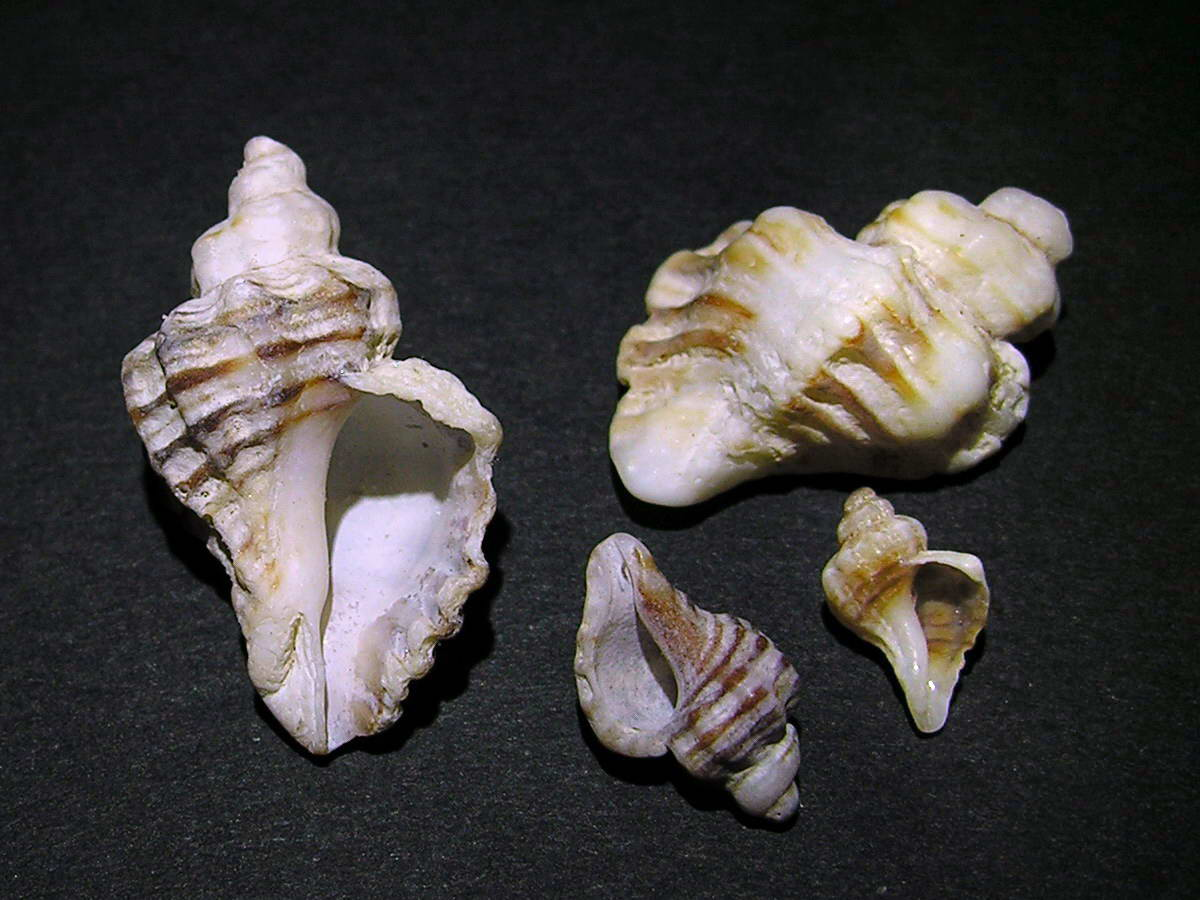 self made